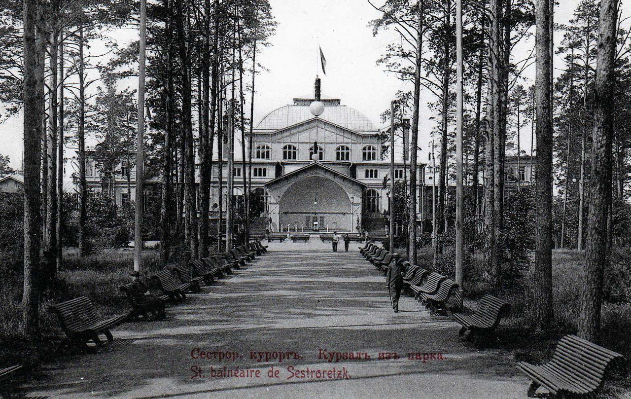 Сестрорецкий курзал